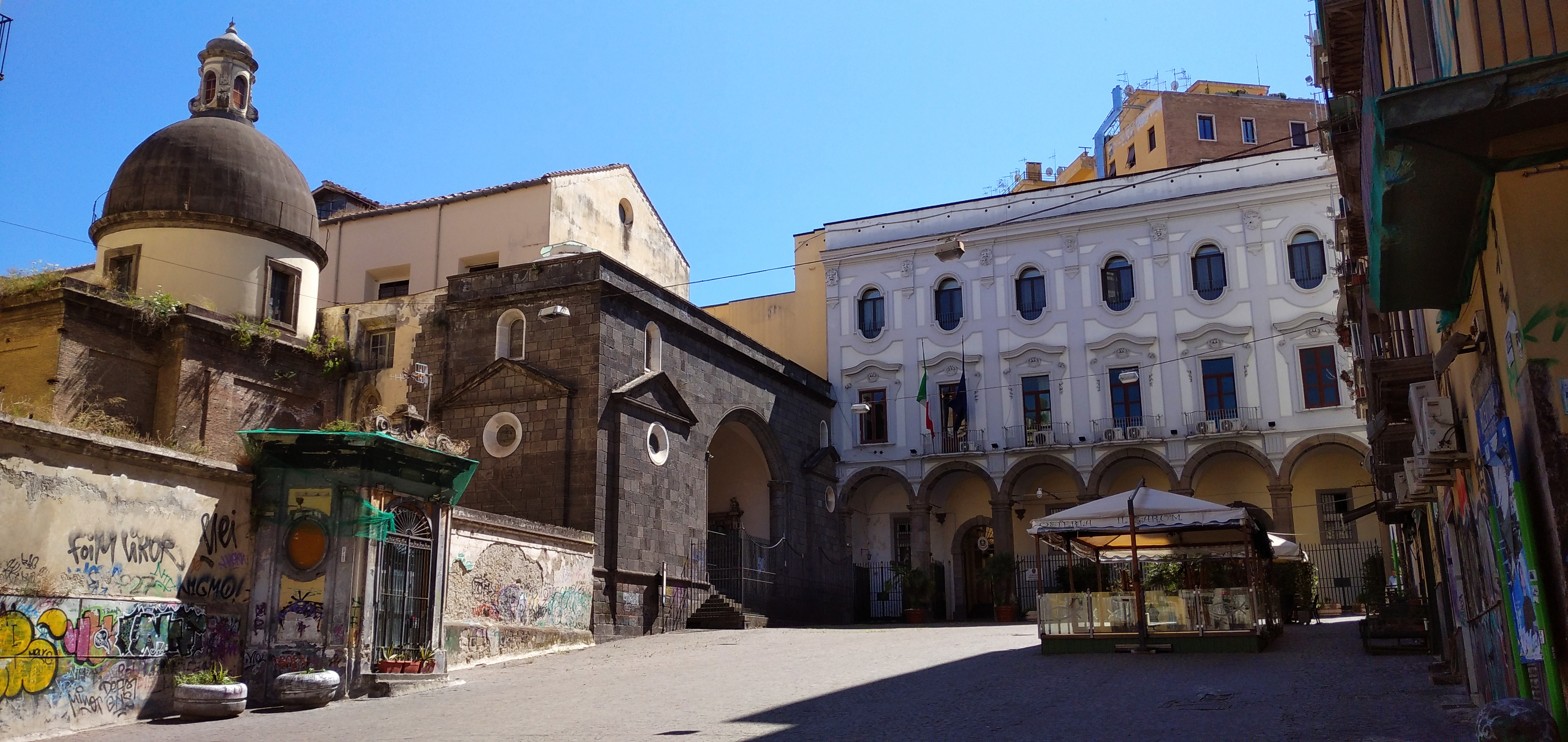 Sant'Anna dei Lombardi ed ex convento